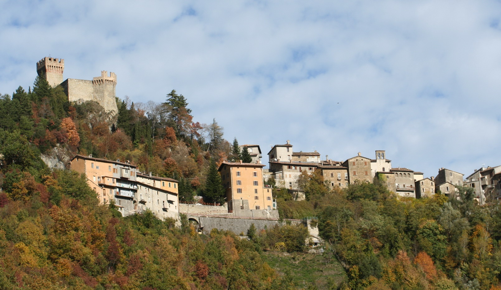 panorama di Arquata del Tronto, esterno giorno, ottobre 2006